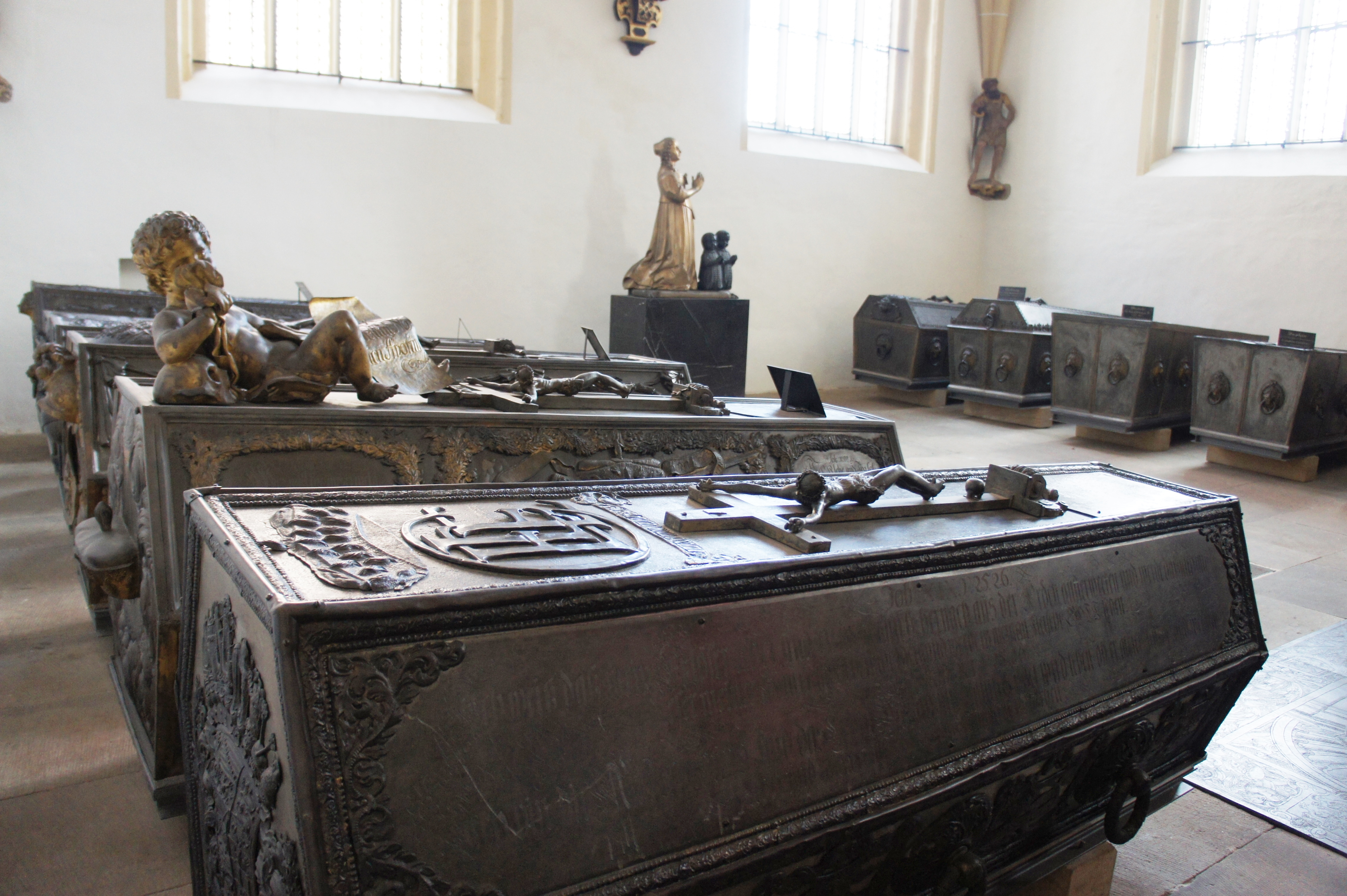 Der Dom zu Freiberg; Prunksärge aus Zinn, Nordkapelle